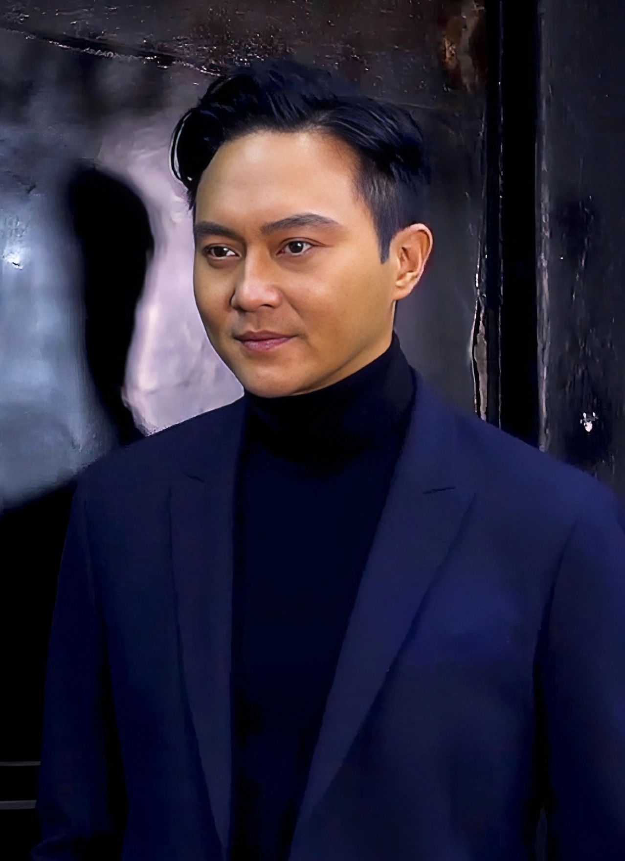 中文（香港）: 2013年萬千星輝頒獎典禮最受歡迎電視男角色、2014年IFPI香港唱片銷量大獎十大銷量本地歌手